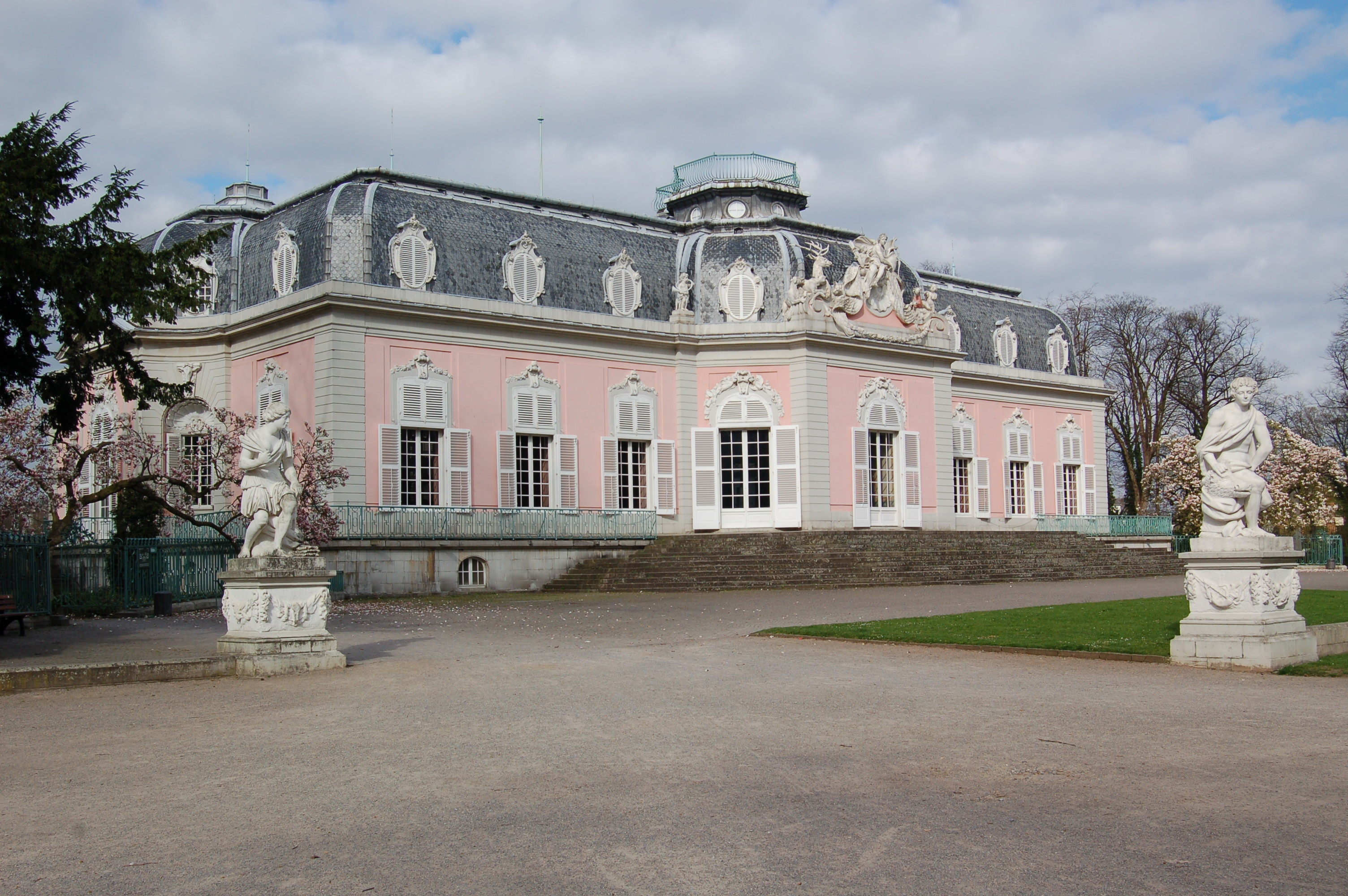 Gartenfassade des Benrather Schlosses